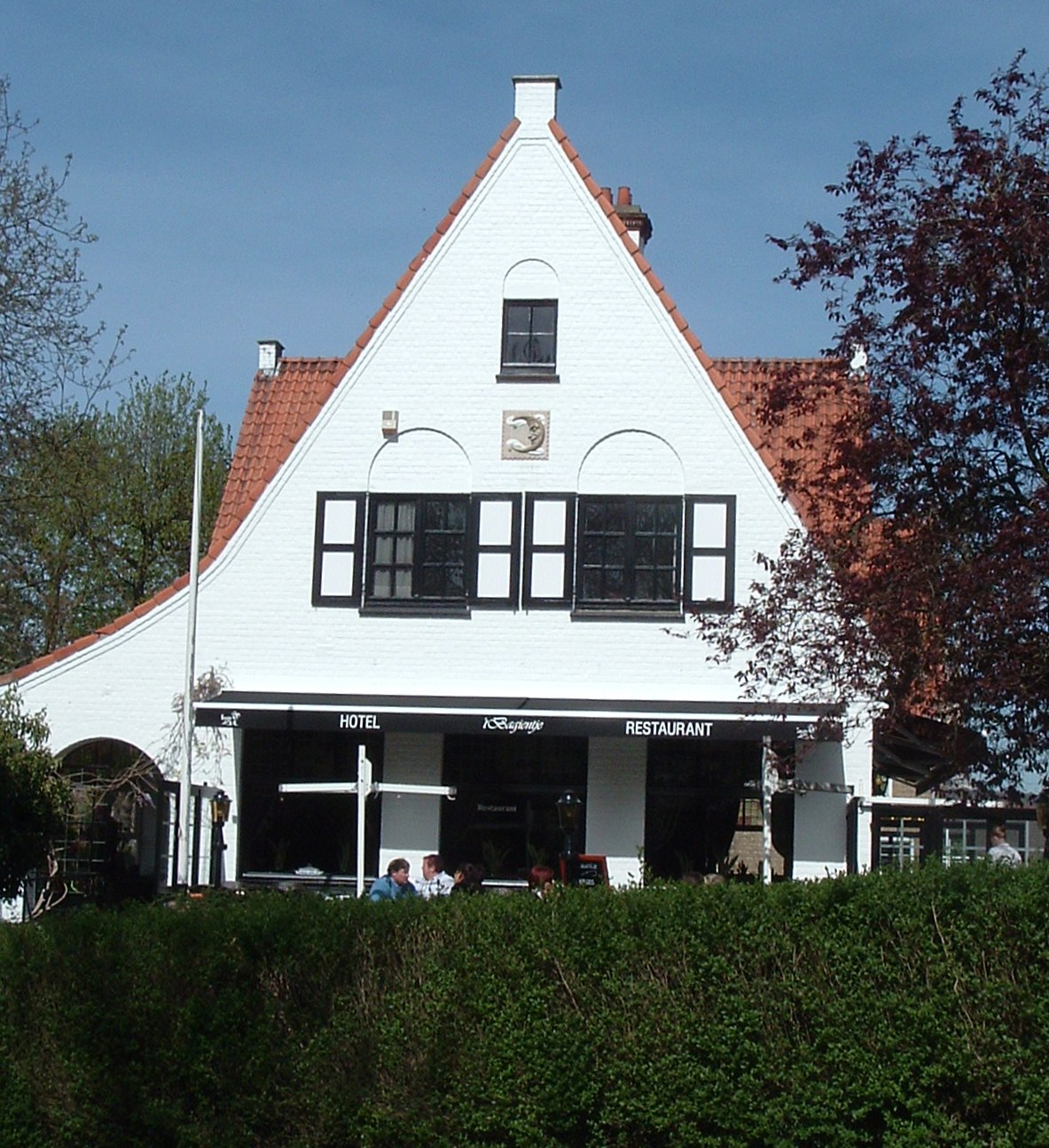 Café met afbeelding van een halve maan in de gevel, ooit gebouwd in opdracht van de gelijknamige Brugse brouwerij.